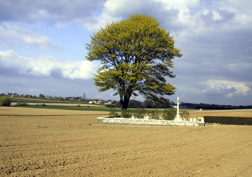 Un cimetière anglais à Vis en Artois